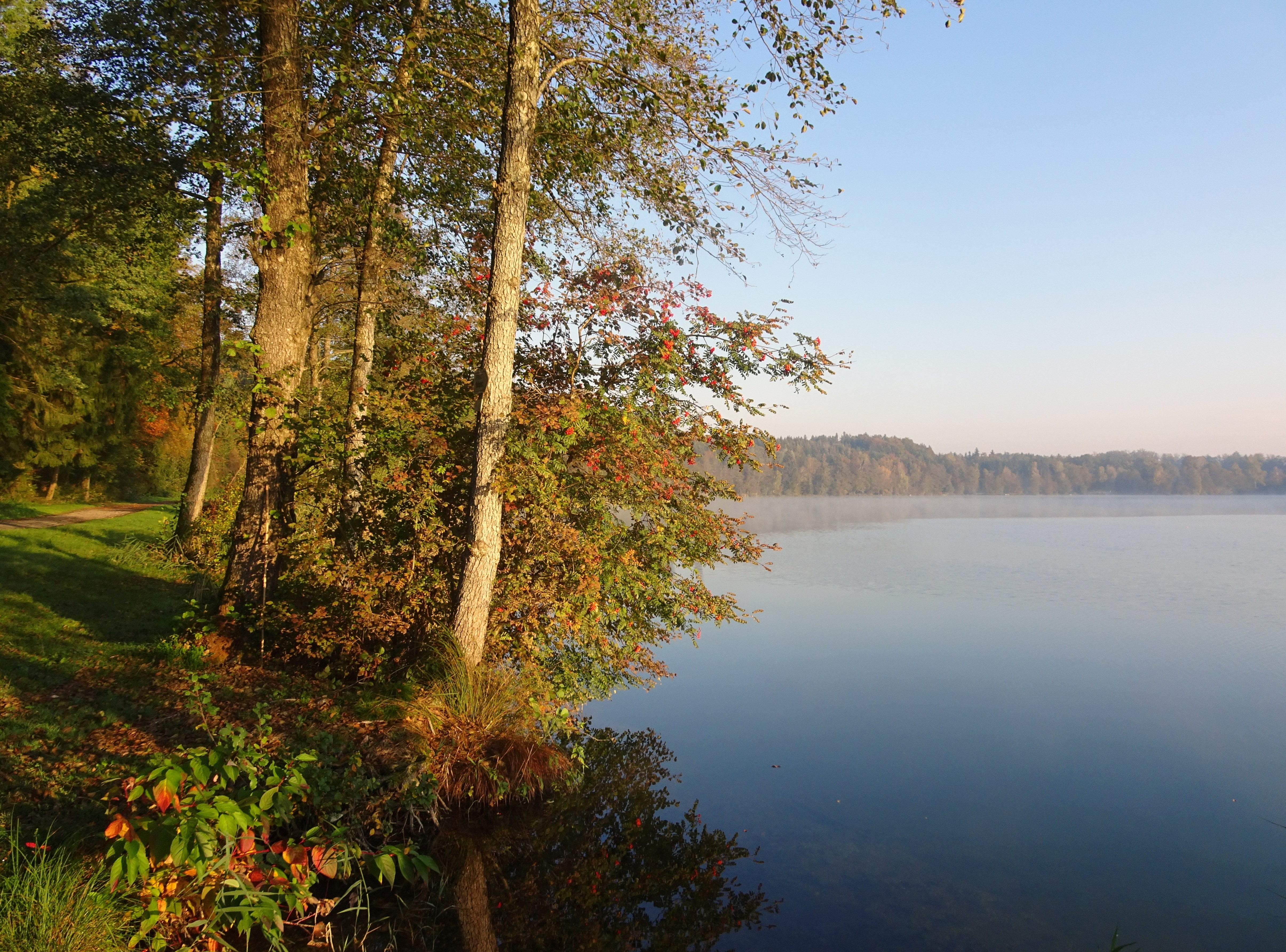 Höllerersee im Oktober